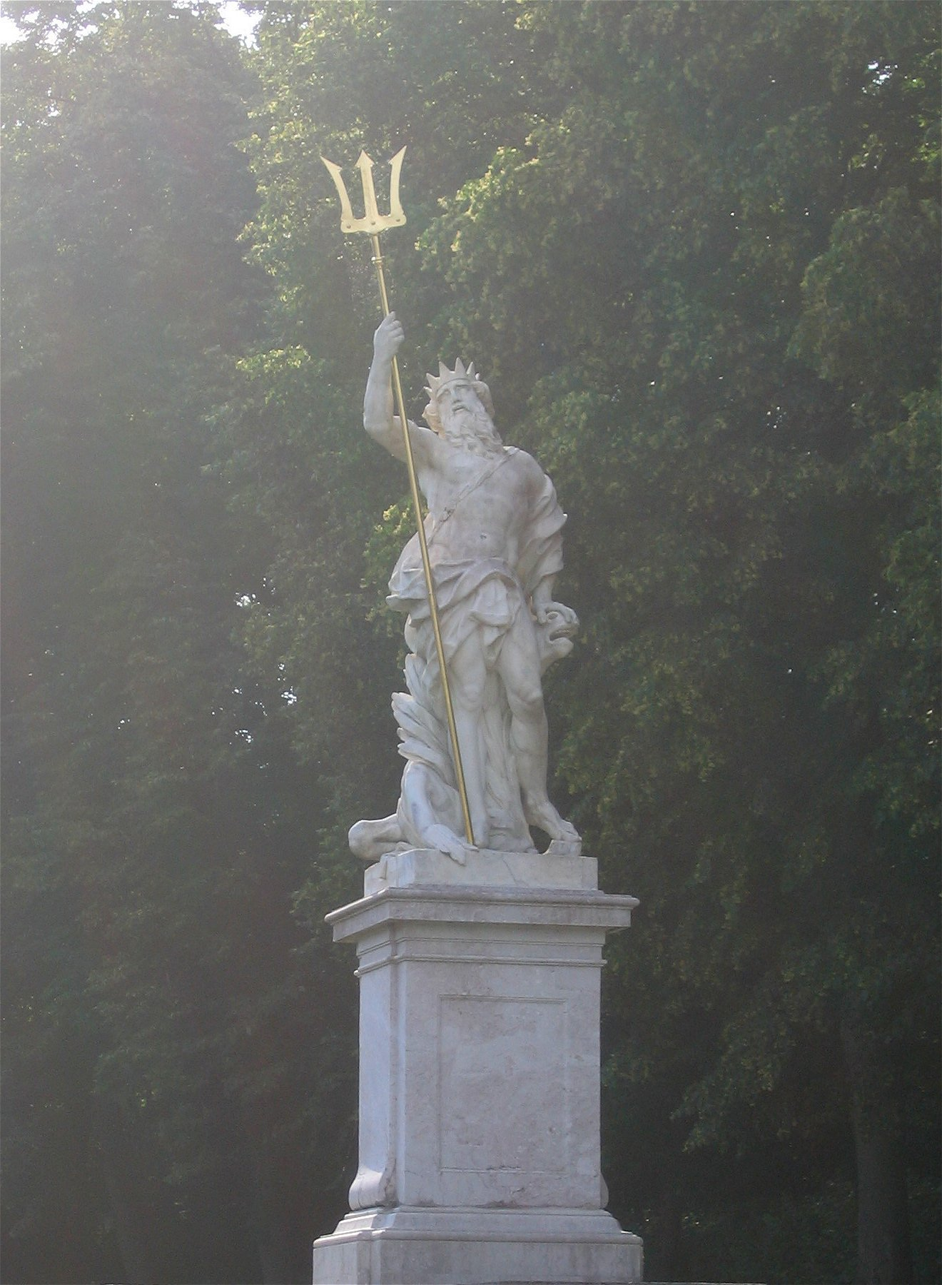 Neptun von Guillaume de Groff (1775), an der Großen Kaskade im Schlosspark Nymphenburg, München